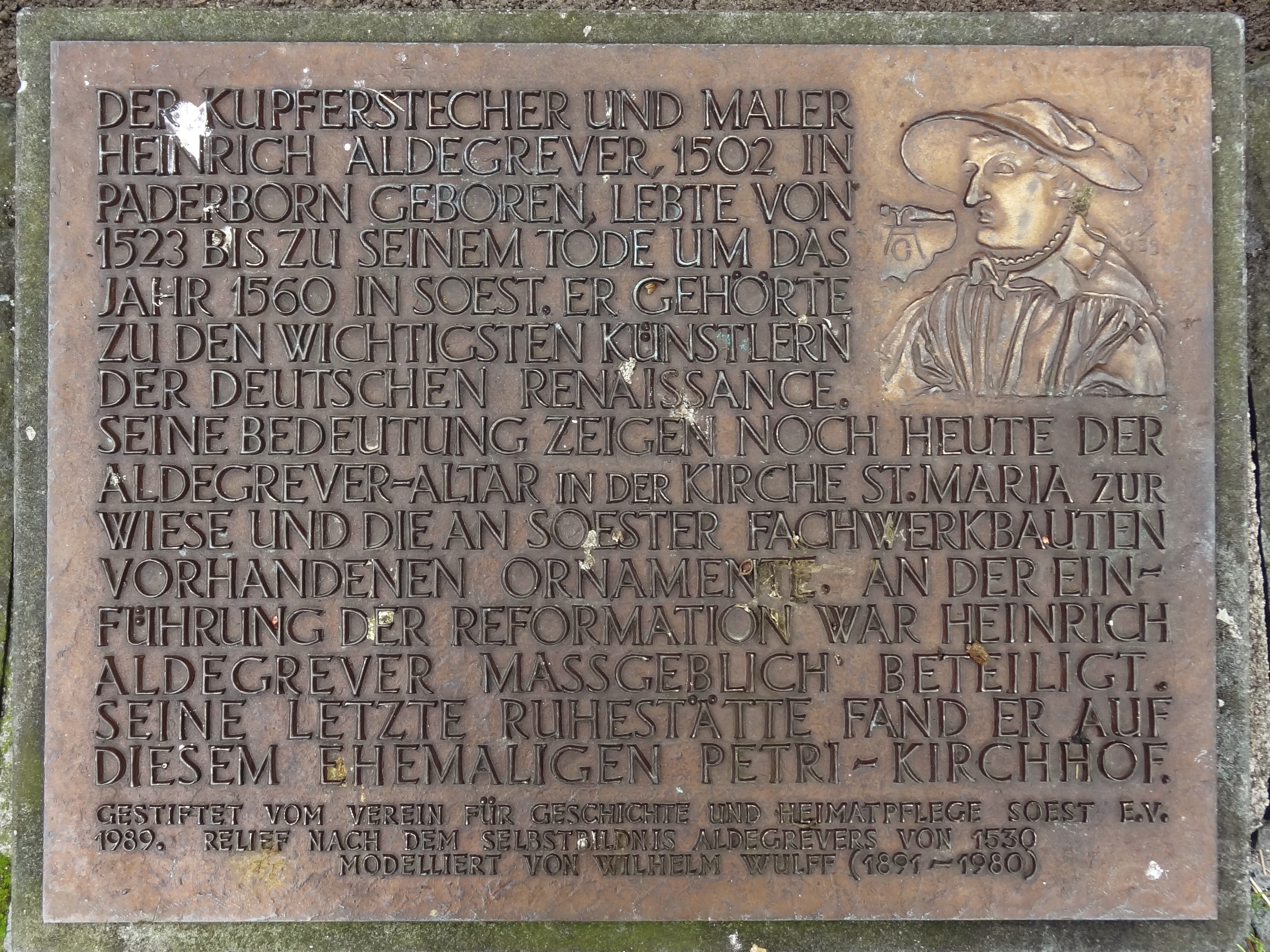 Soest, Petristrasse; Gedenktafel an Heinrich Aldegrever